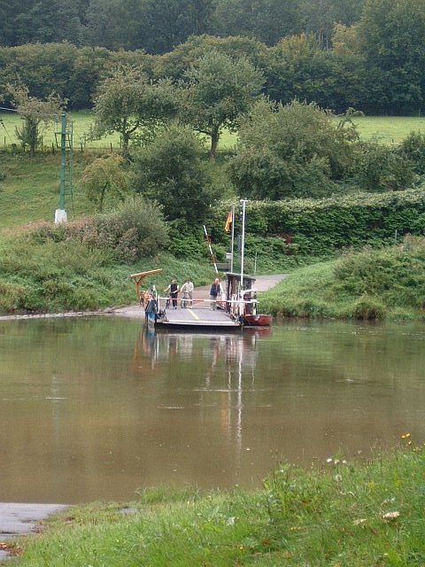 Weserfähre (Wahmbeck-Gewissenruh) bei Wahmbeck, Ortsteil von Bodenfelde. Sie befindet sich auf der Gewissenruher Seite. Gierseilfähre.